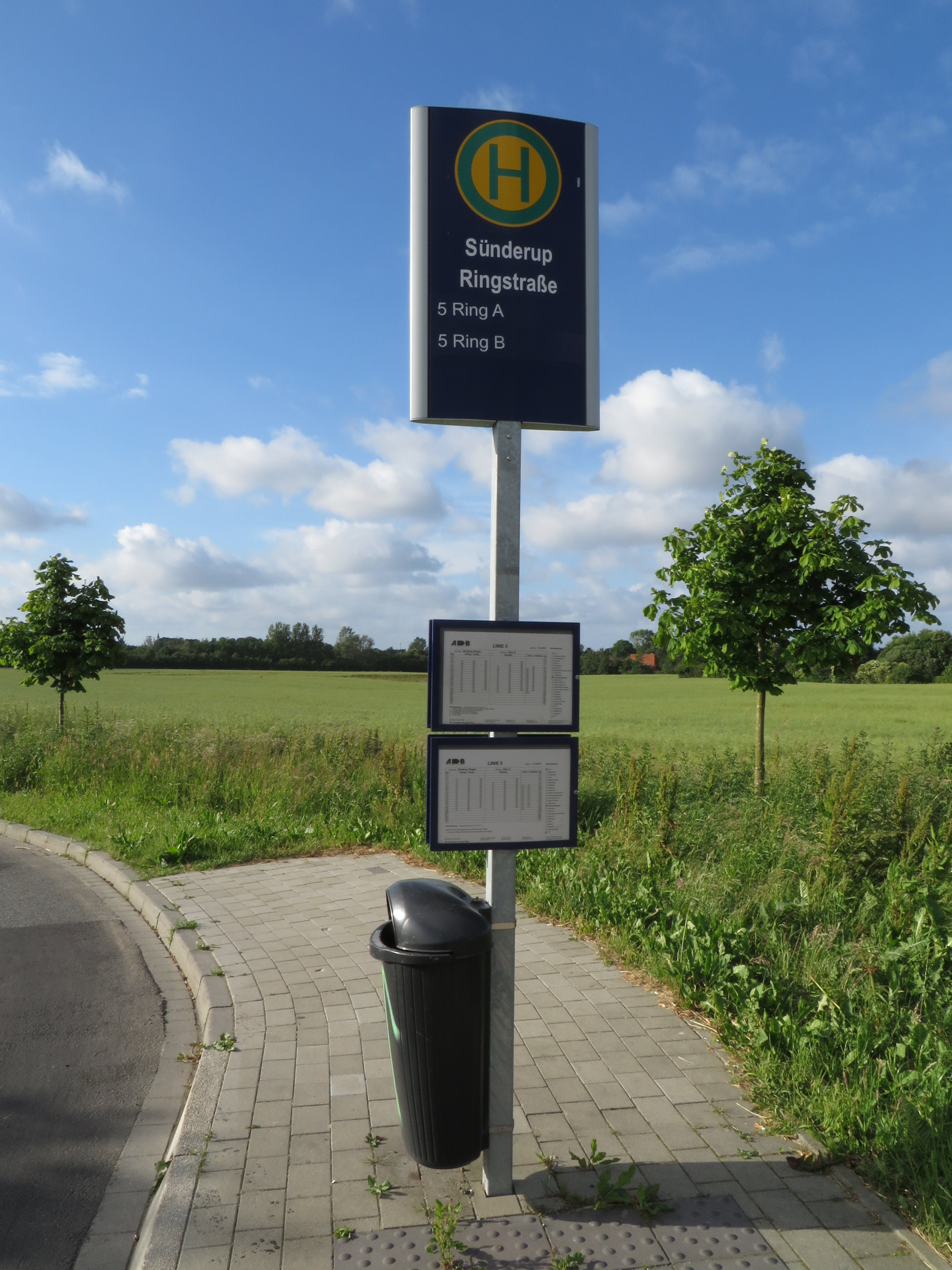 Bushaltestelle Sünderup Ringstraße 5 Ring A 5 Ring B (Flensburg)